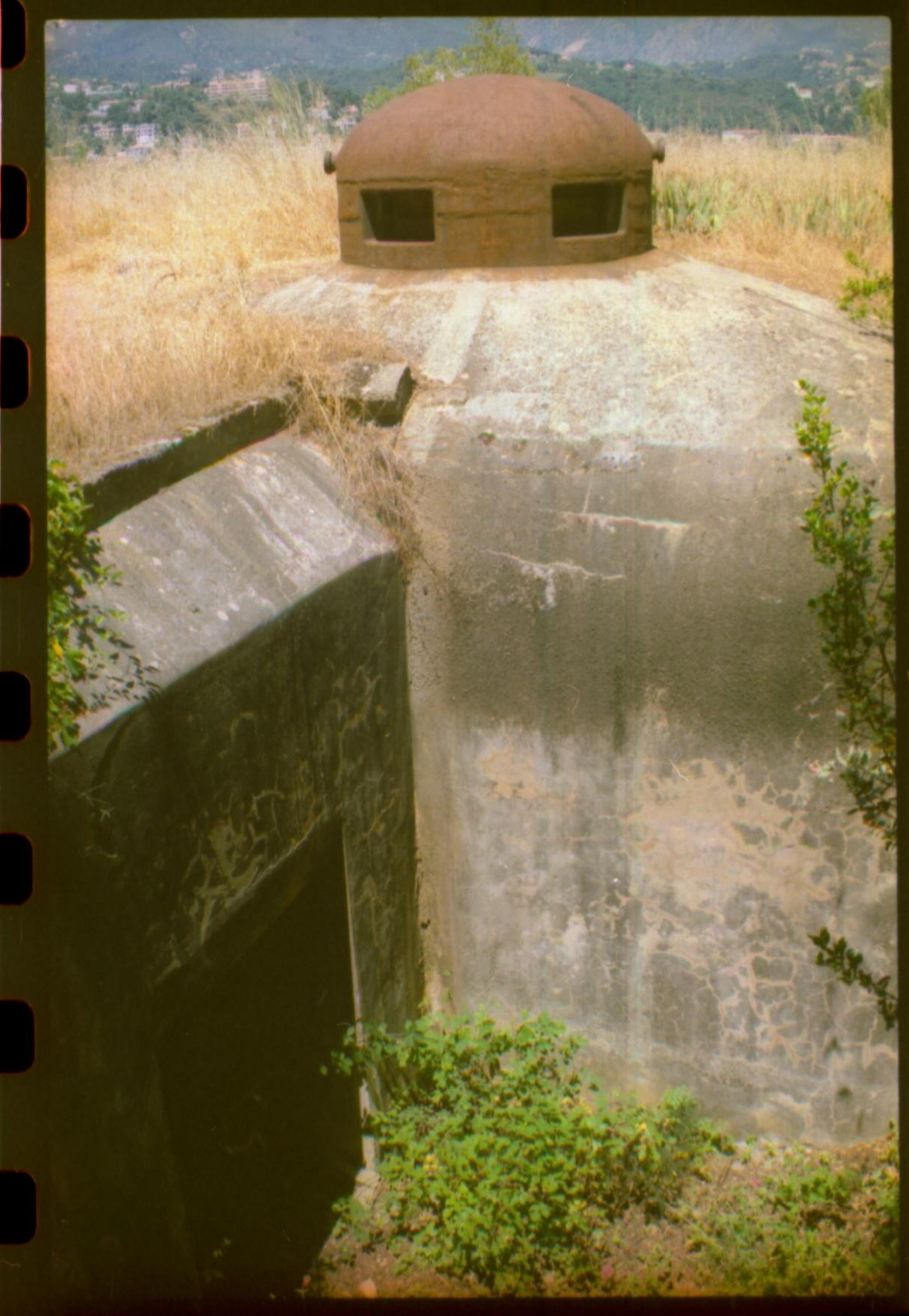 CAP MARTIN - Ouvrage d'artillerie